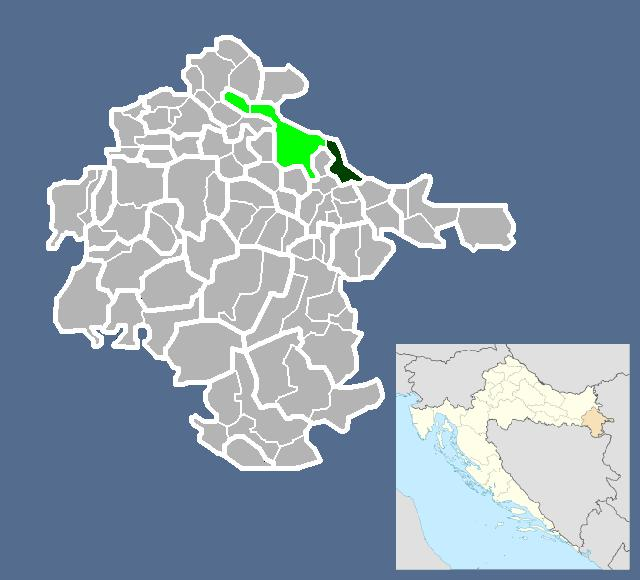 Српски (ћирилица): Вуковарско-сремска жупанија- Сотин.